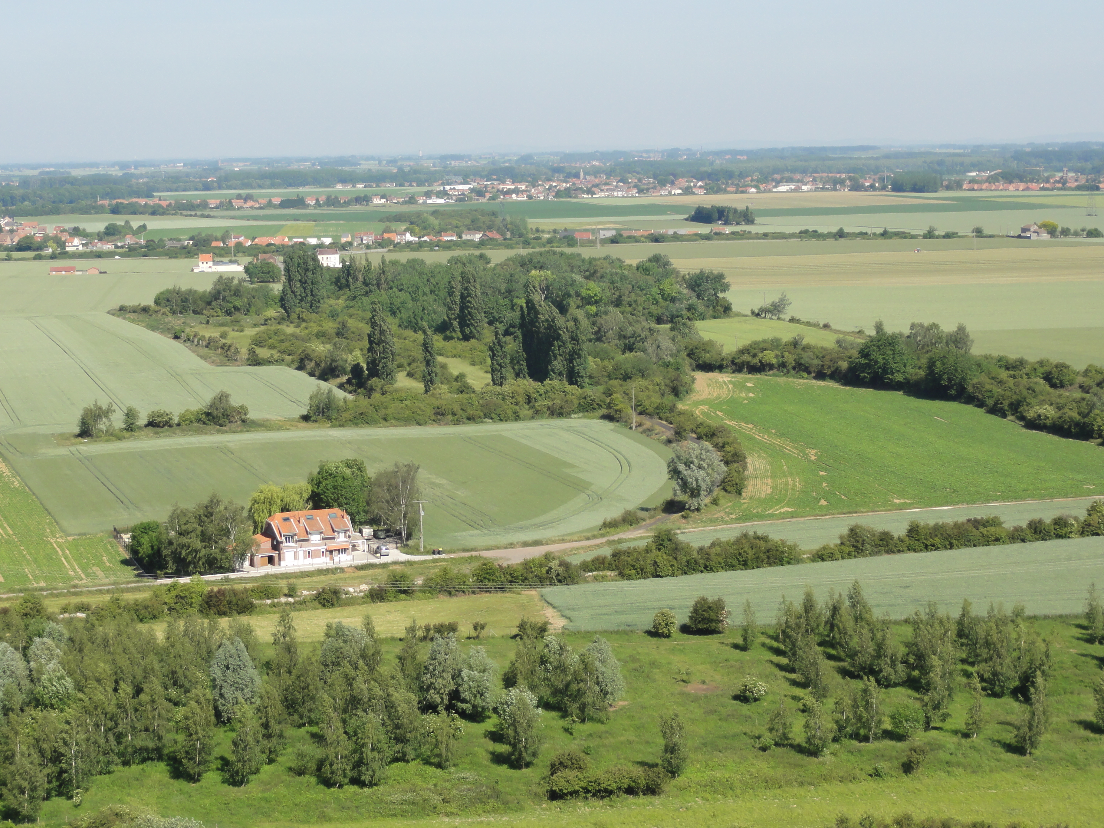 La Fosse n° 6 de la Compagnie des mines de Meurchin était un charbonnage constitué d'un seul puits situé à Carvin, Pas-de-Calais, Nord-Pas-de-Calais, France.